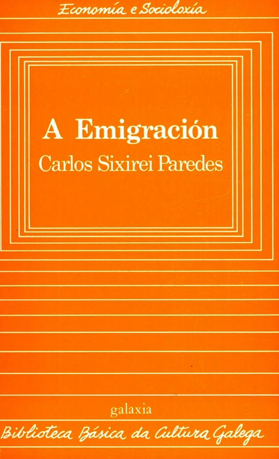 Biblioteca Básica da Cultura Galega, 25, A Emigración, Carlos Sixerei Paredes.jpg